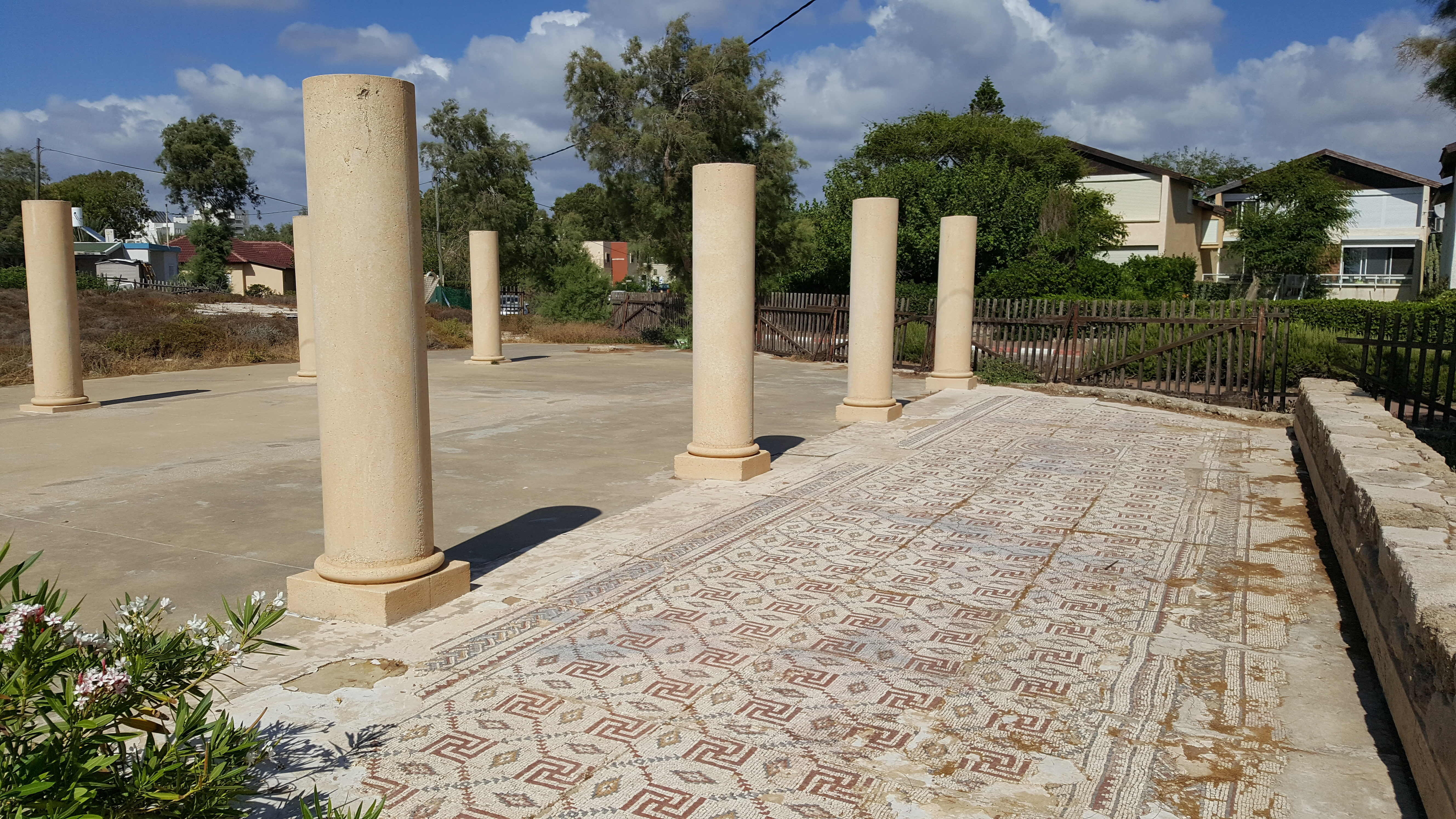 מרכז מבקרים המנוהל על ידי עמותה, ששימורו החל לפני כעשור שנים. המרכז ממוקם במבנה הקרוי "בית רחל ינאית" על שמה של רעיית נשיא מדינת ישראל לשעבר, רחל ינאית בן-צבי. תפקידו של המרכז להנציח ולשמר את מורשת יהודי פקיעין ואת מורשת משפחת זינאתי עתיקת-היומין. מרגלית זינאתי, הנצר האחרון למשפחה, מתגוררת במבנה ושומרת על בית הכנסת העתיק בפקיעין הממוקם בסמוך.